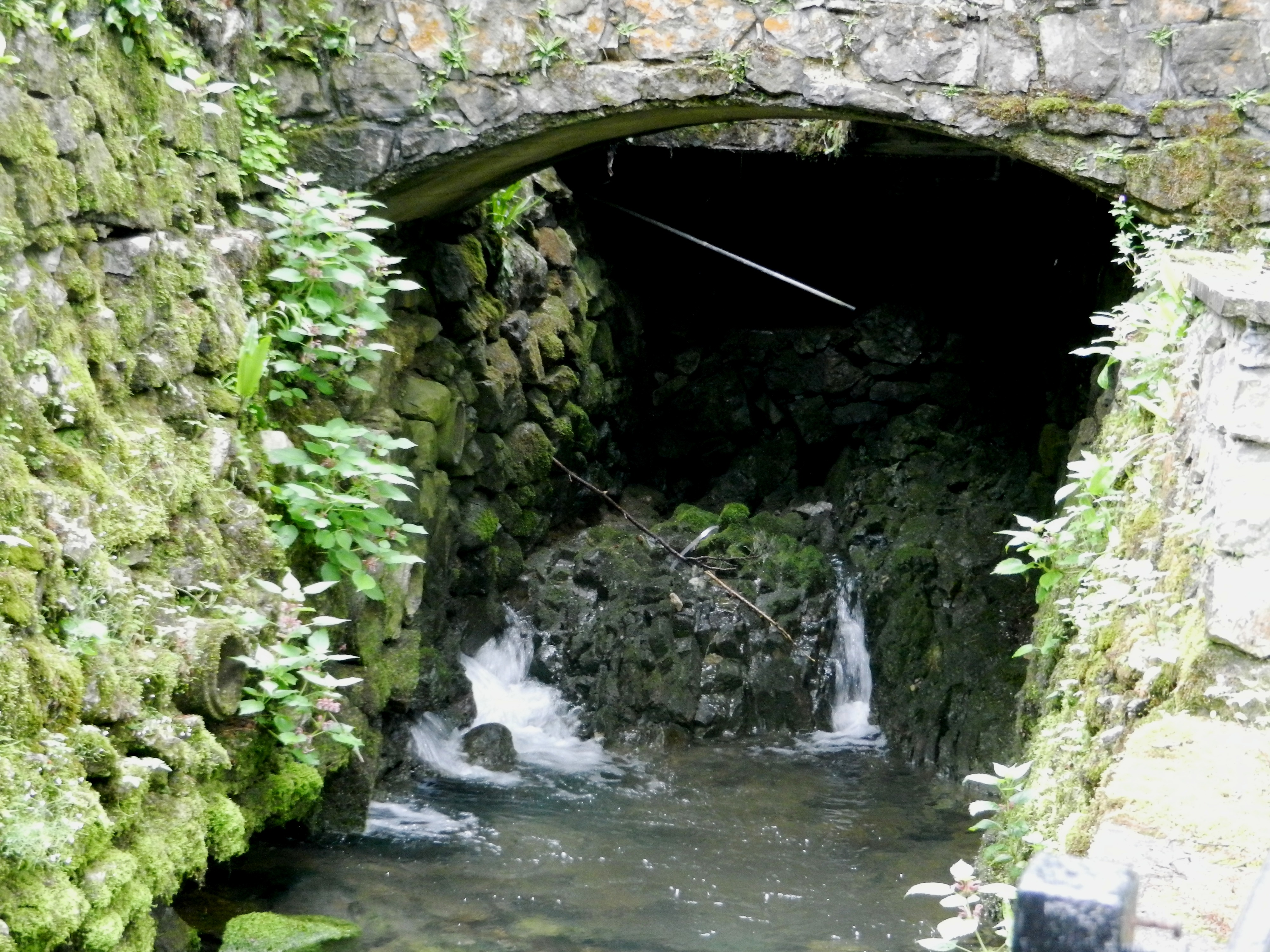 Izvir pod kapelico, Veliki Močilnik, izvir Ljubljanice.